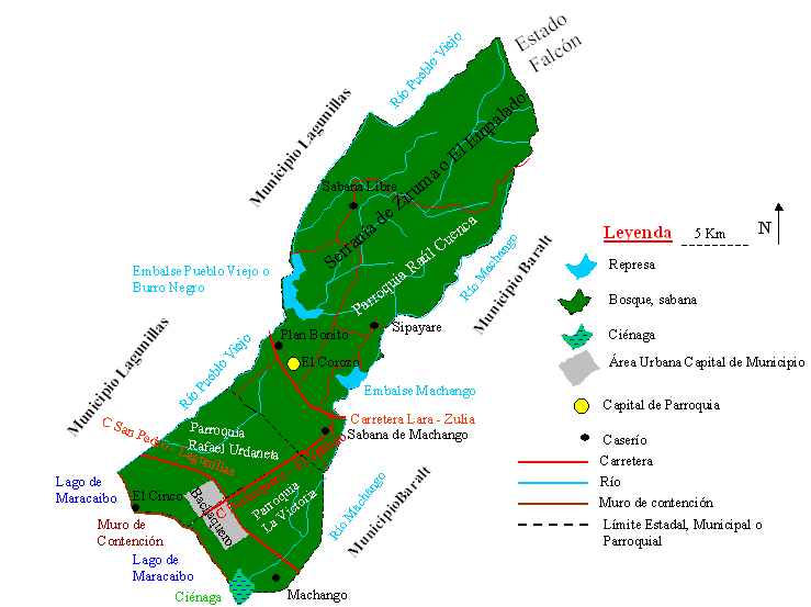 Mapa del Municipio Valmore Rodríguez, Estado Zulia, Venezuela